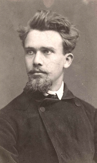 portrett, mann, billedkunstner, billedhugger, brystbilde.